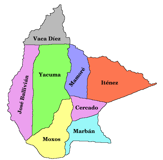 Carte du département de Beni en Bolivie